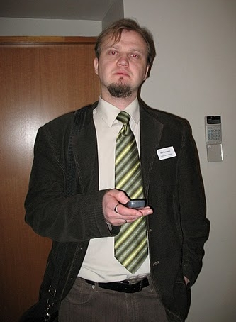 Anti Poolamets Erakonna Eestimaa Rohelised Tallinna piirkonna asutamiskoosolekul Tallinna Ülikooli peahoones